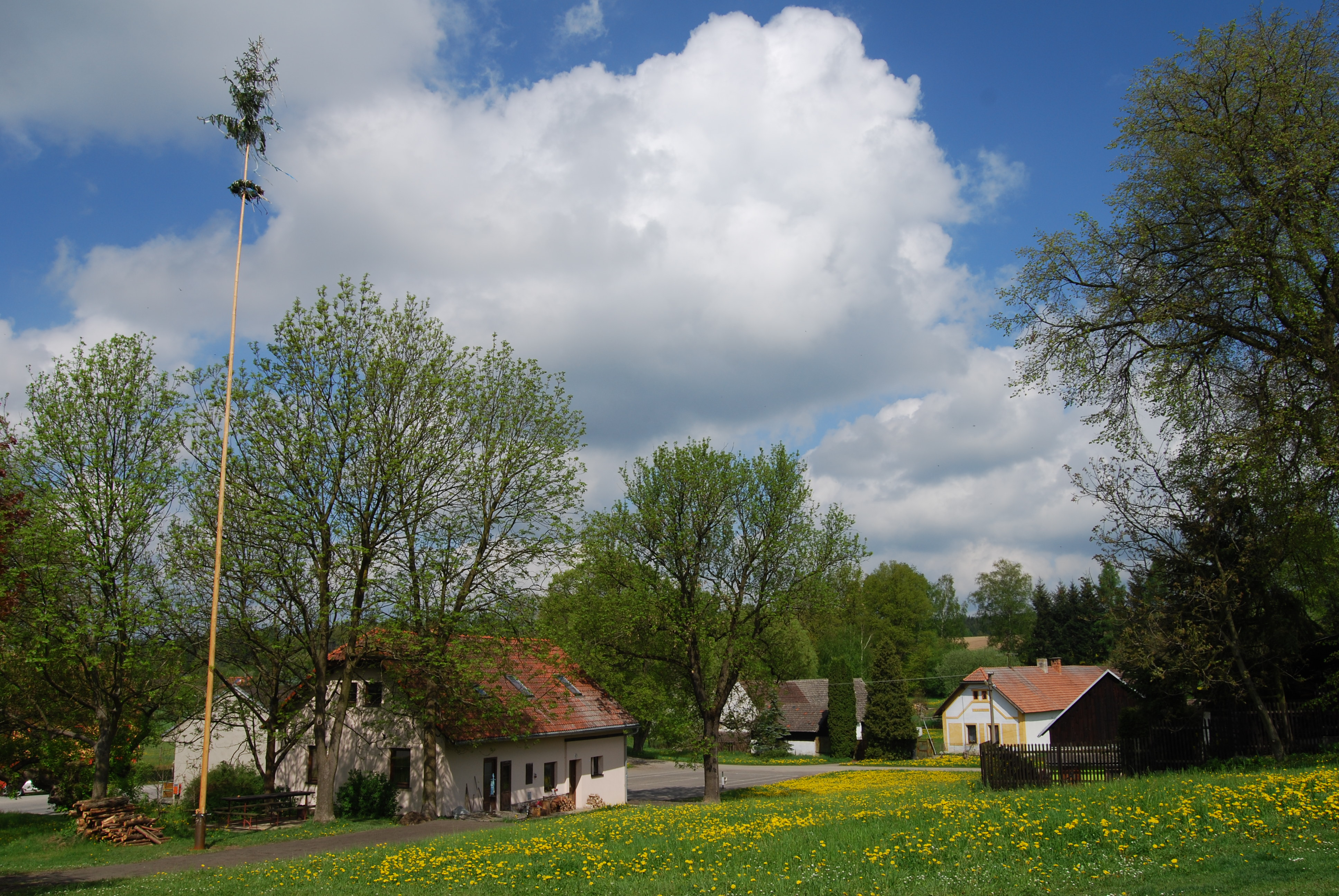 Pohled na část návsi s májkou. Podboří je vesnice, část obce Opařany v okrese Tábor. Česká republika.